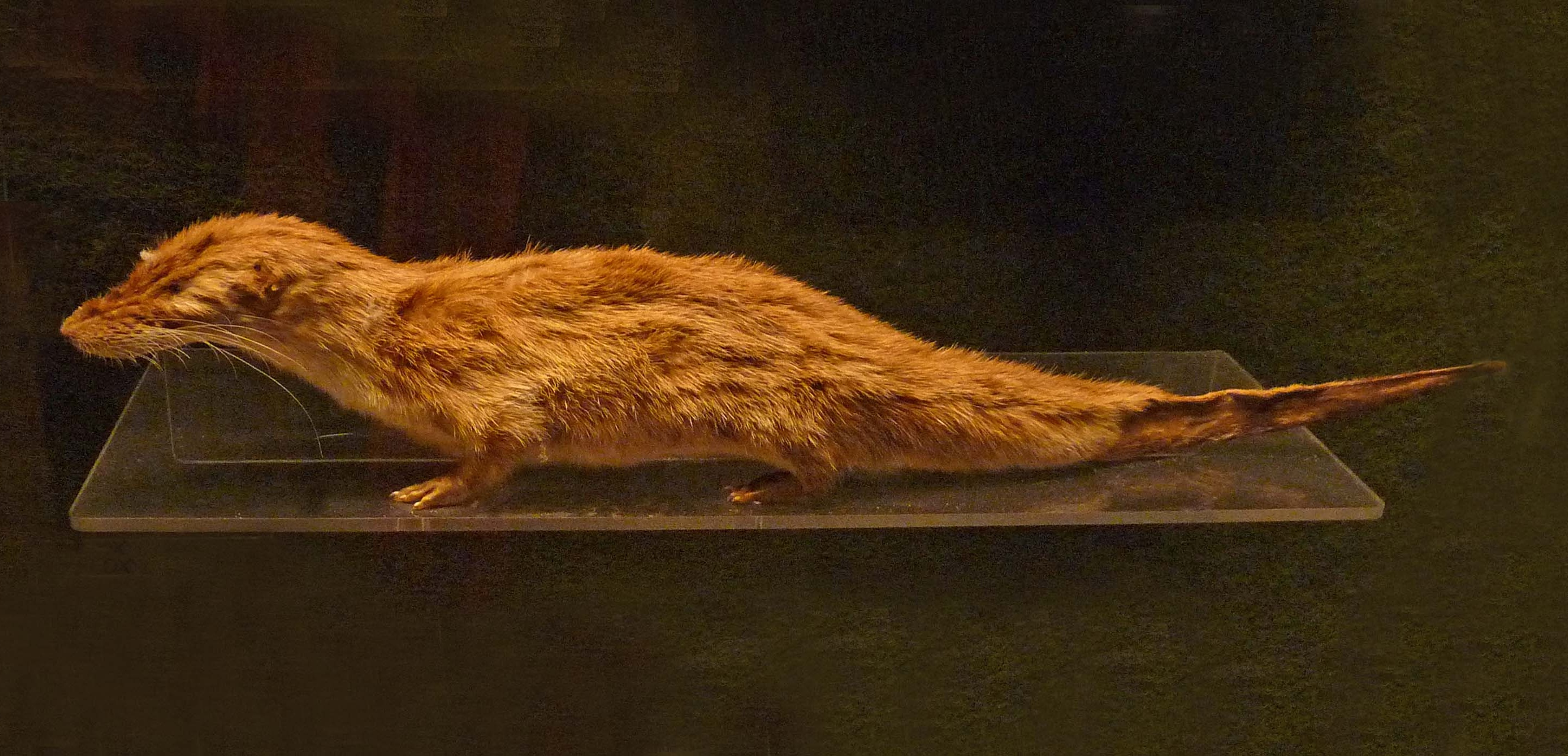 Potamogale velox, mâle, Cameroun, 1904, au Musée zoologique de Strasbourg